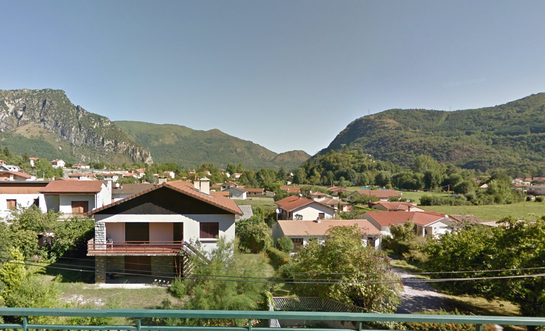 Village de Quié dans l'Ariège.